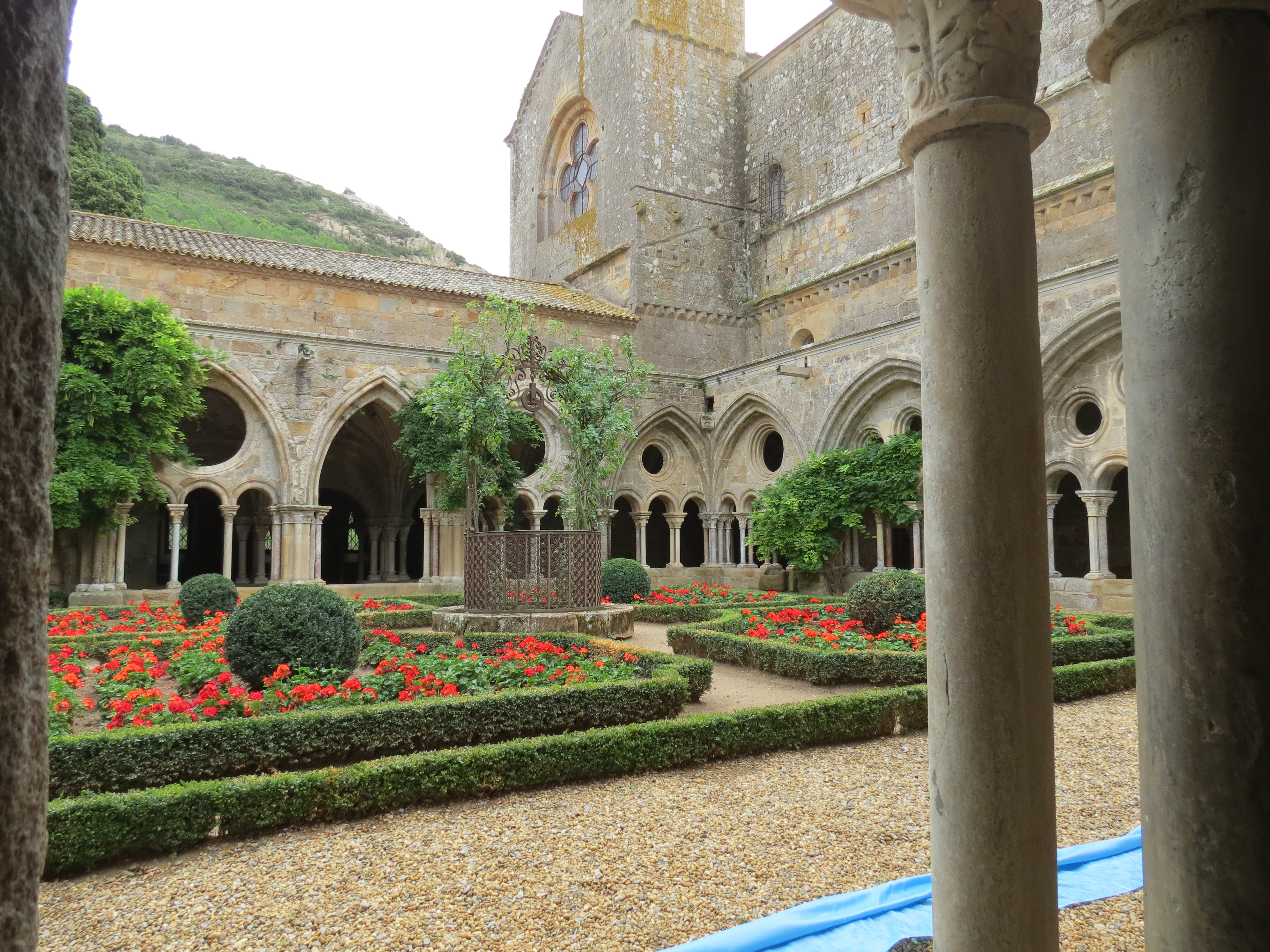 Abbaye de Fontfroide, Narbonne, Aude, Languedoc-Roussillon.